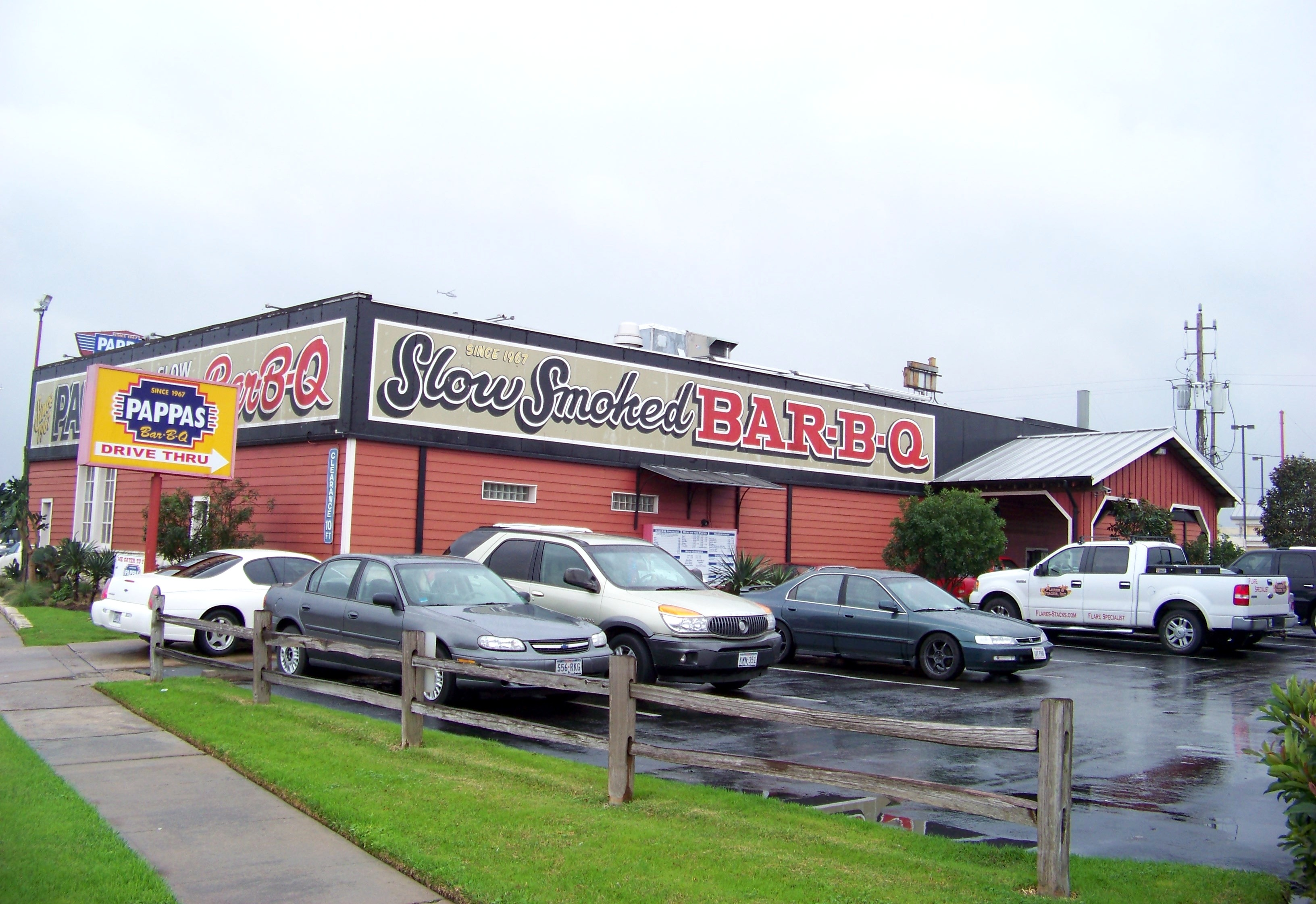 Pappas BBQ